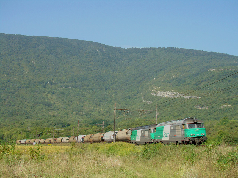 train de marchandise vu entre Ambérieu et Culoz tracté par les BB.67544 et 67507